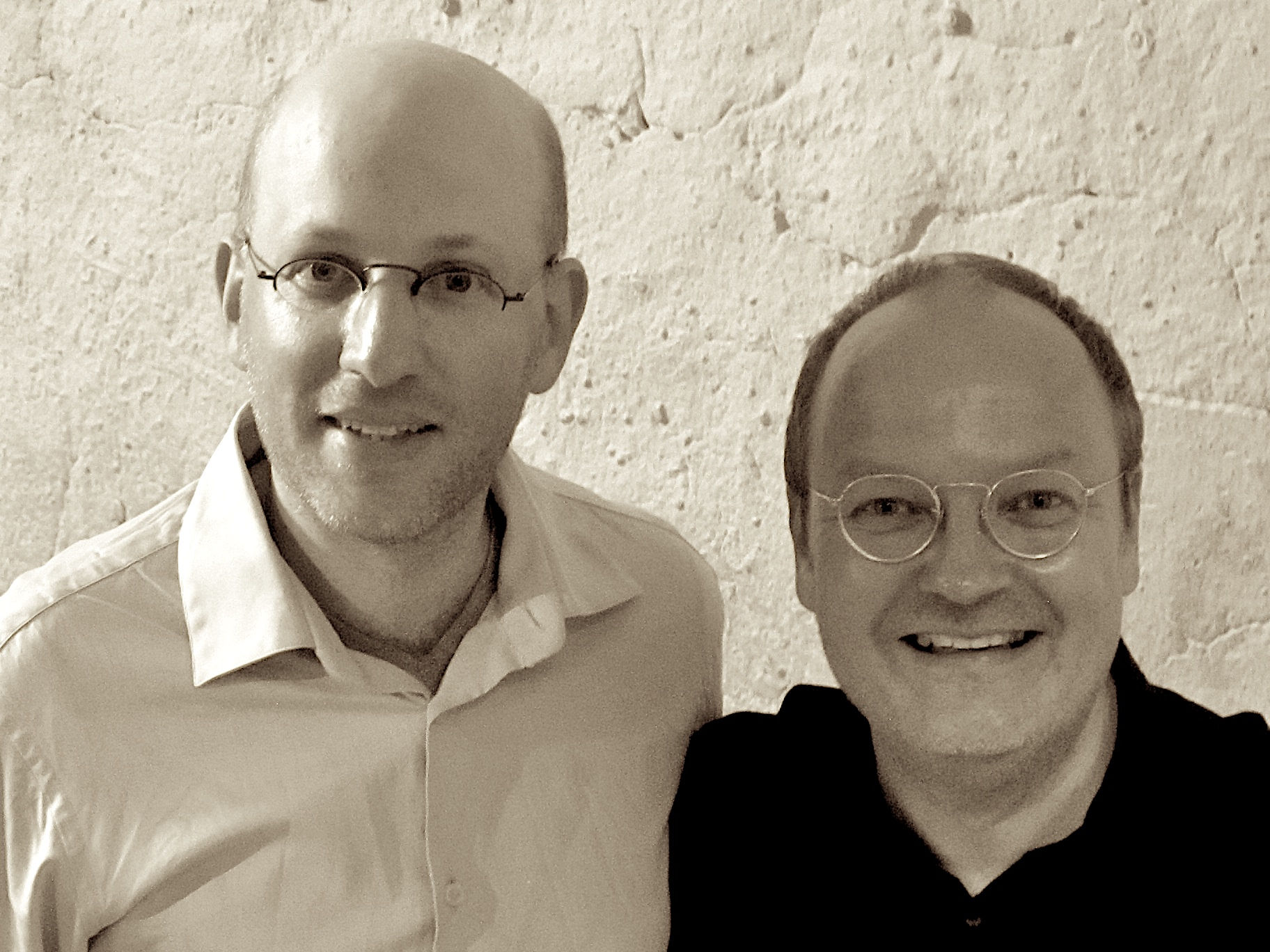 Henrik Albrecht (links) und Jens Wawrczeck (rechts) nach einer Lesung in der Alten Kantine der Kulturbrauerei Berlin